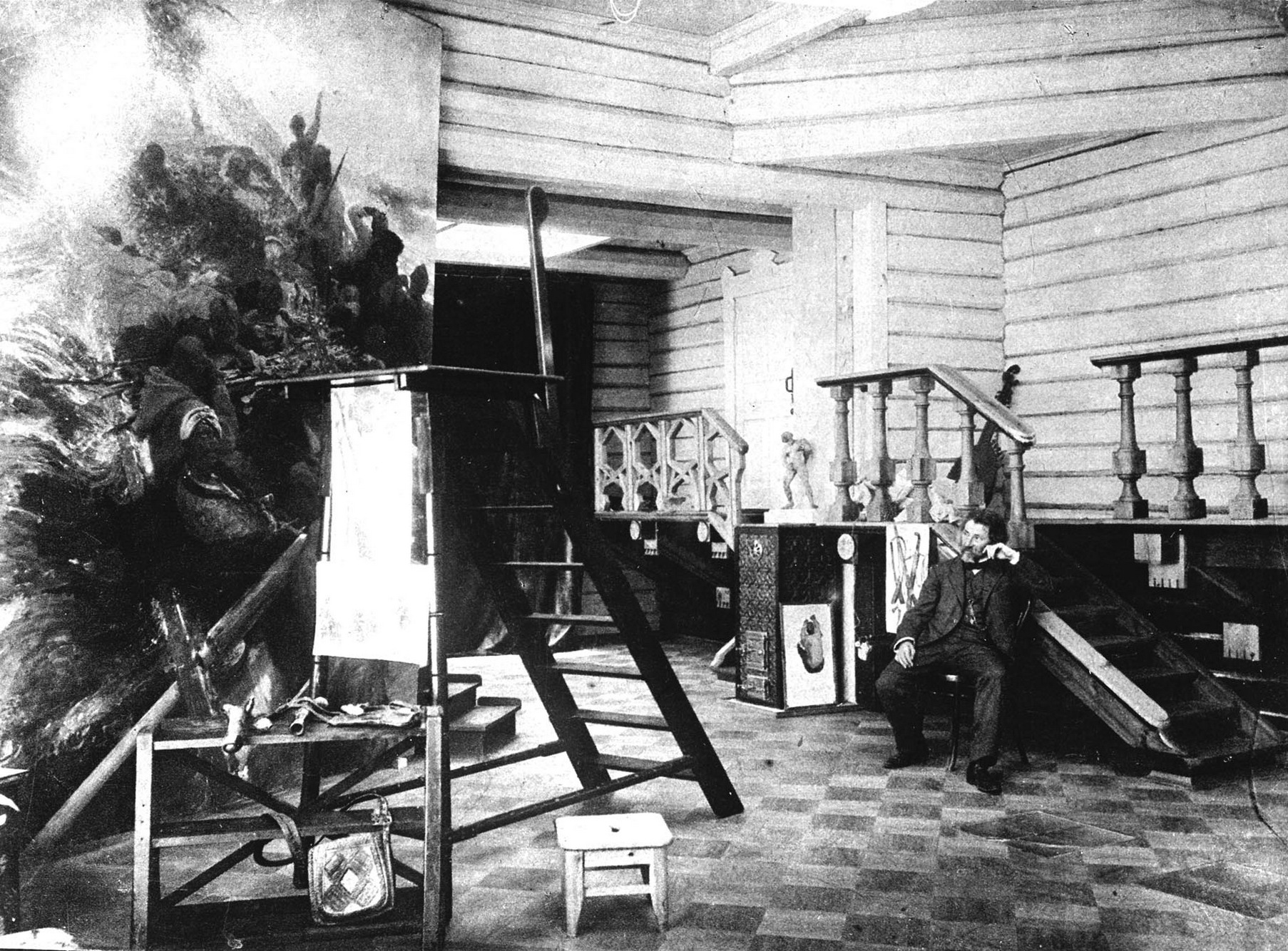 Репино СПб музей Пенаты